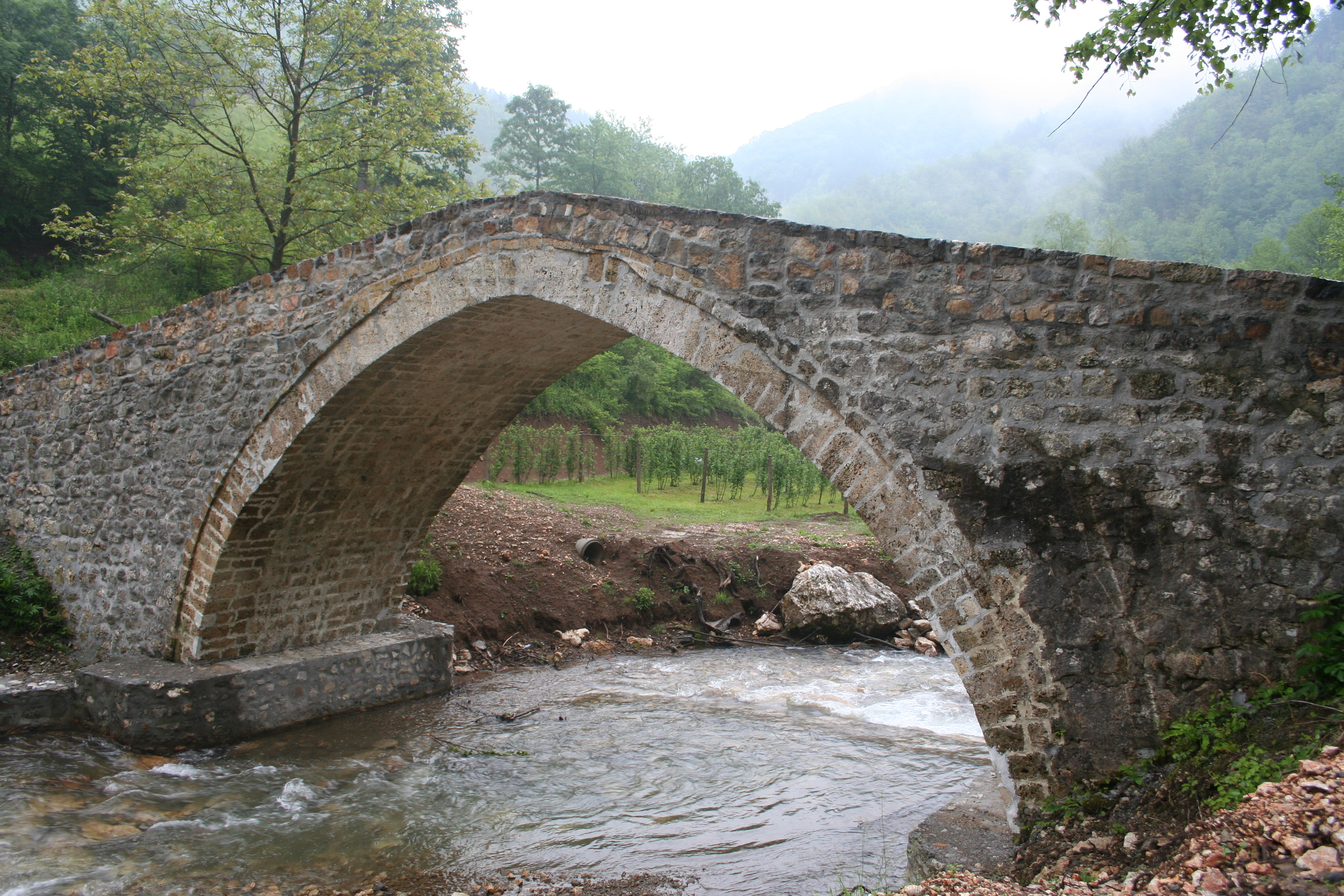 Kameni most (Rimski most) u Donjoj Orovici, Ljubovija